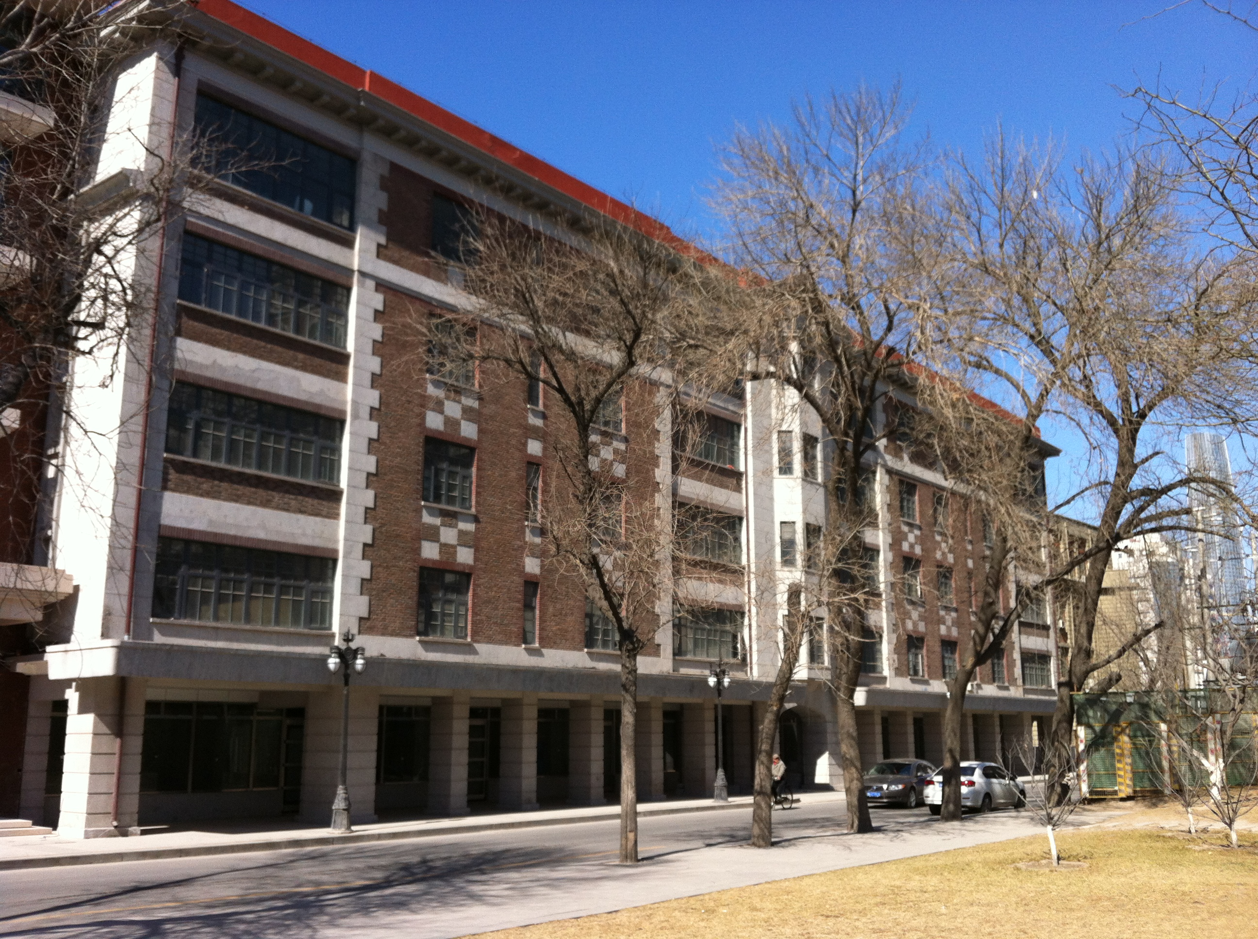 中文（中国大陆）: 花园大楼现状